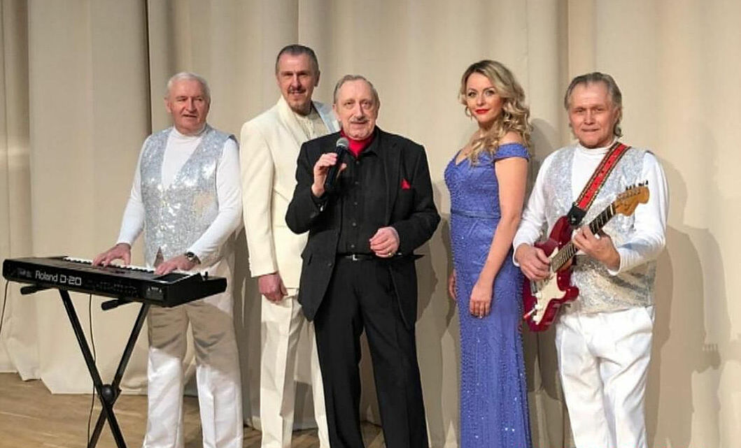 ВИА «ПЛАМЯ» с Николаем Аверюшкиным. ВИА «Пламя» под руководством Юлии Ариничевой.